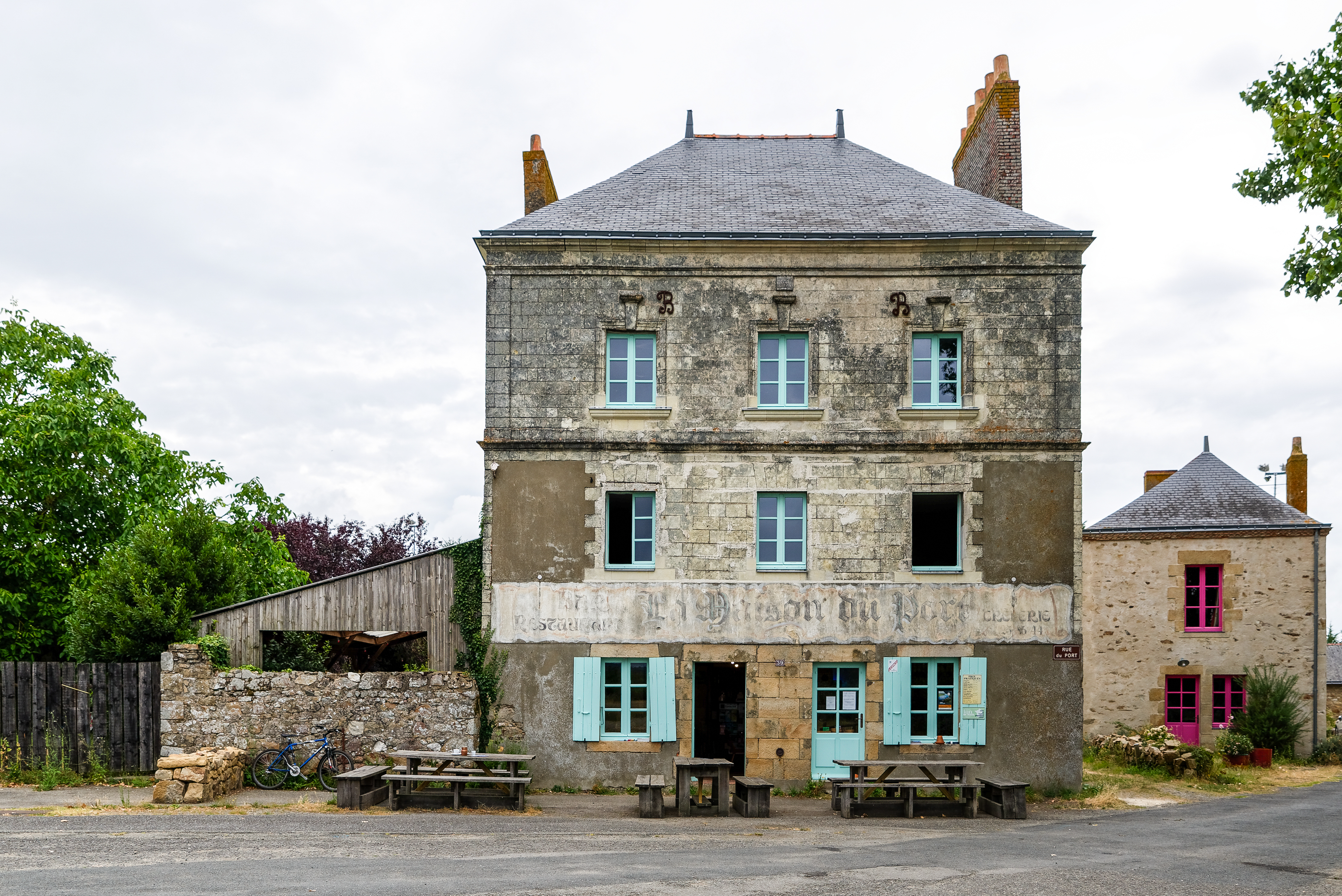 Auberge ayant servi de modèle pour "La maison dans la Loire", située sur le port de Lavau-sur-Loire (Loire-Atlantique, Pays de la Loire, France)